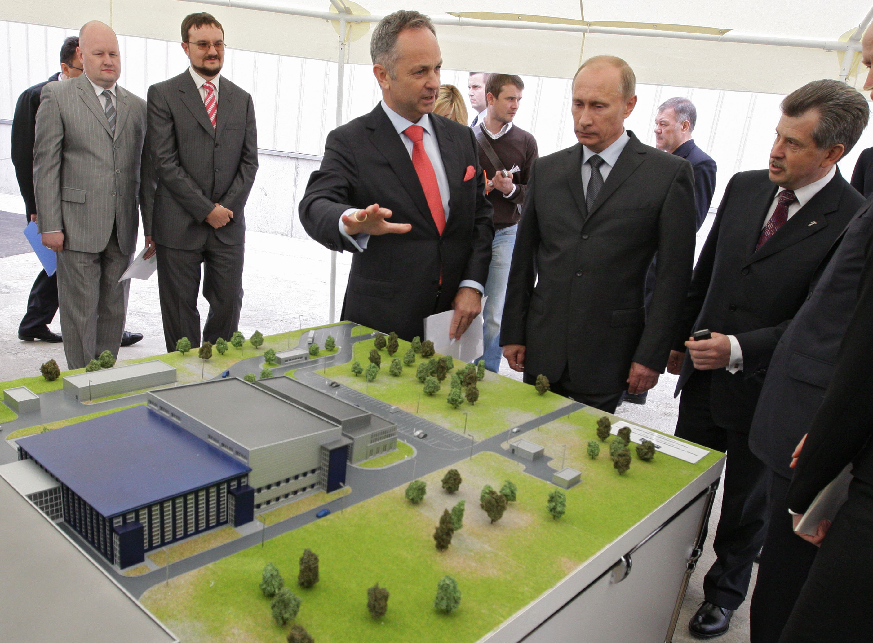 18 июня 2010. В ходе рабочей поездки в Ярославскую область В.В.Путин ознакомился с фармацевтическим кластером региона. Представитель компании и губернатор области С. Вахруков показывают ему макет завода Nycomed.